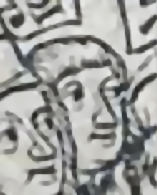 De Johannes Coricius, Auszuch aus engem Holzschnëtt. Quell: Wimpheling, Jakob, 1502. Defensio Germaniae Jakobi Wimphelingi. Fribv.